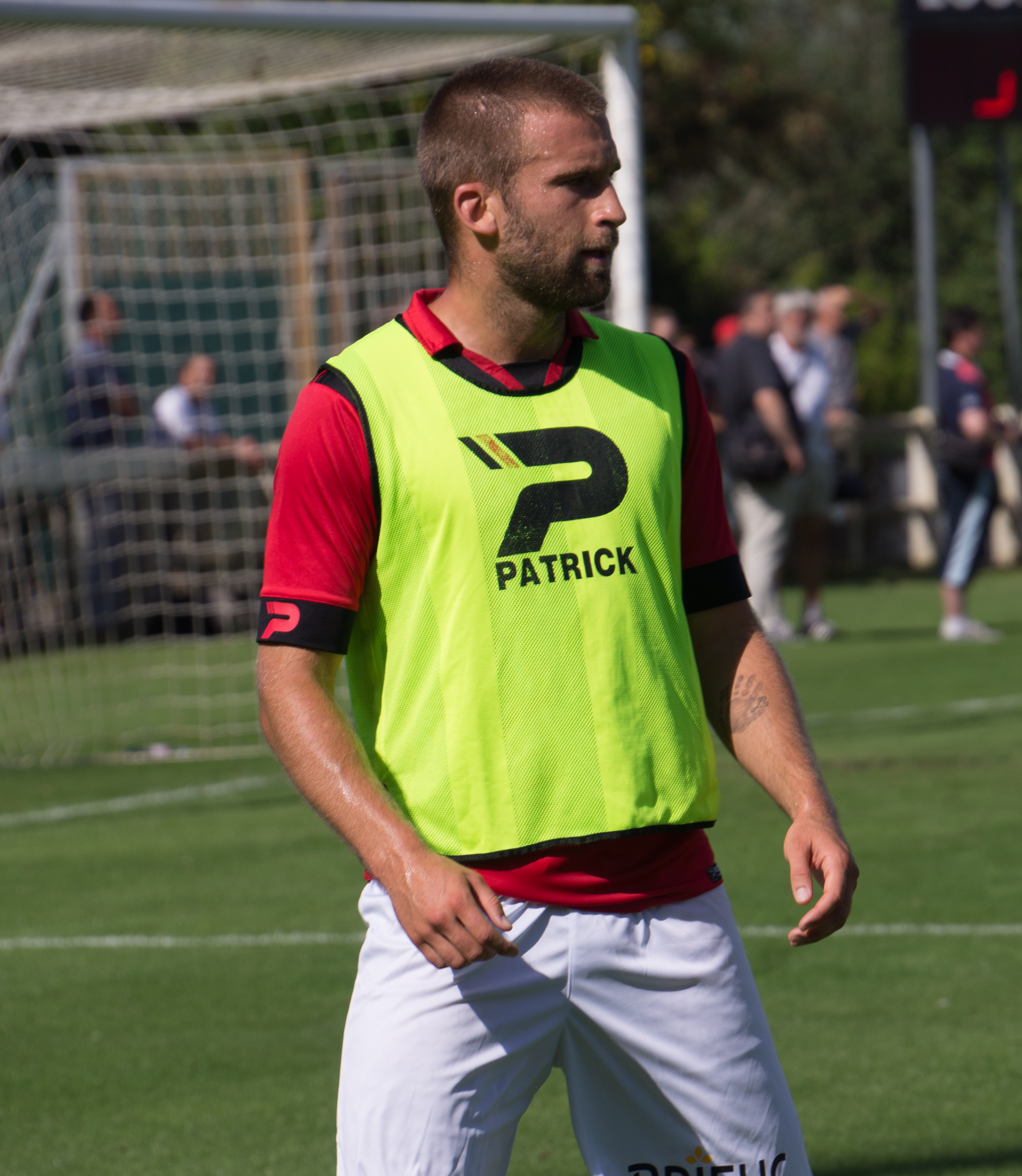 Lucas Deaux le 24 juillet 2016